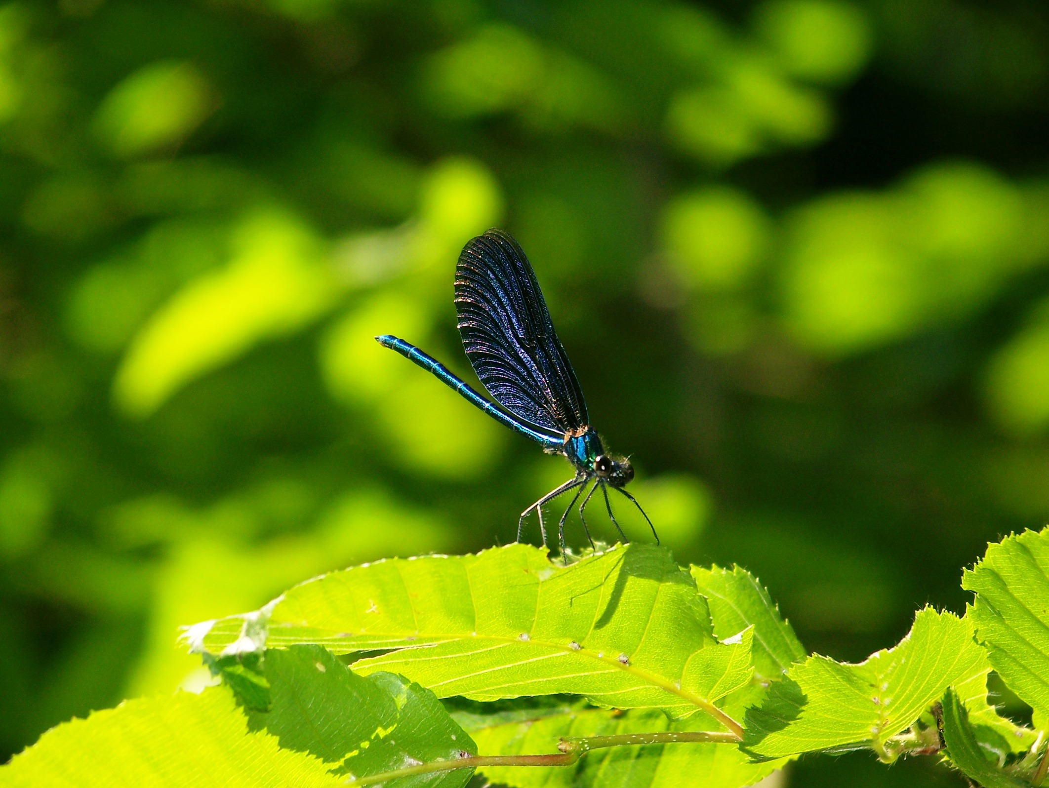 Ważka - Drawieński Park Narodowy, niebieski szlak, między osadą Ostrowiec a Węgornią